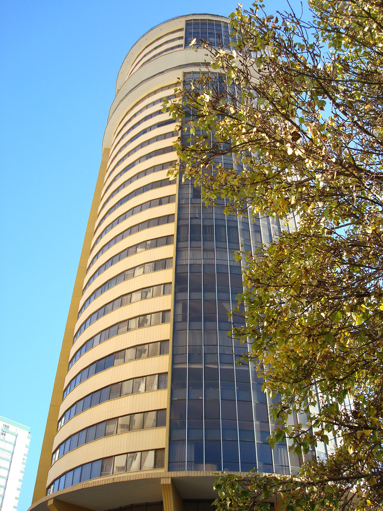 Edificio Las Americas de la ciudad de La Paz, Bolivia.